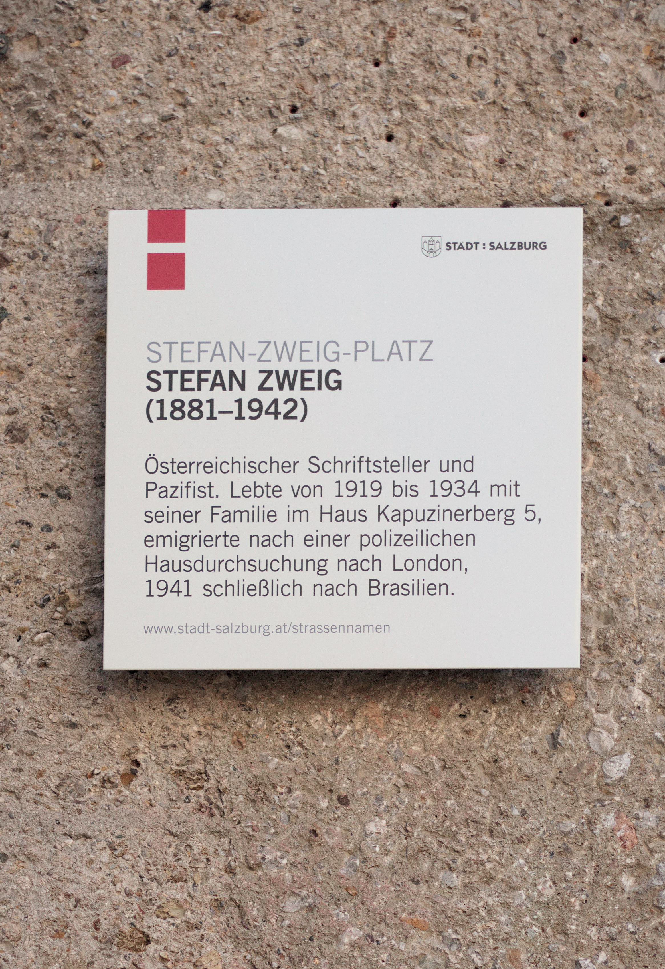 Salzburg, rechte Altstadt: Stefan-Zweig-Platz - Straßennamenschild